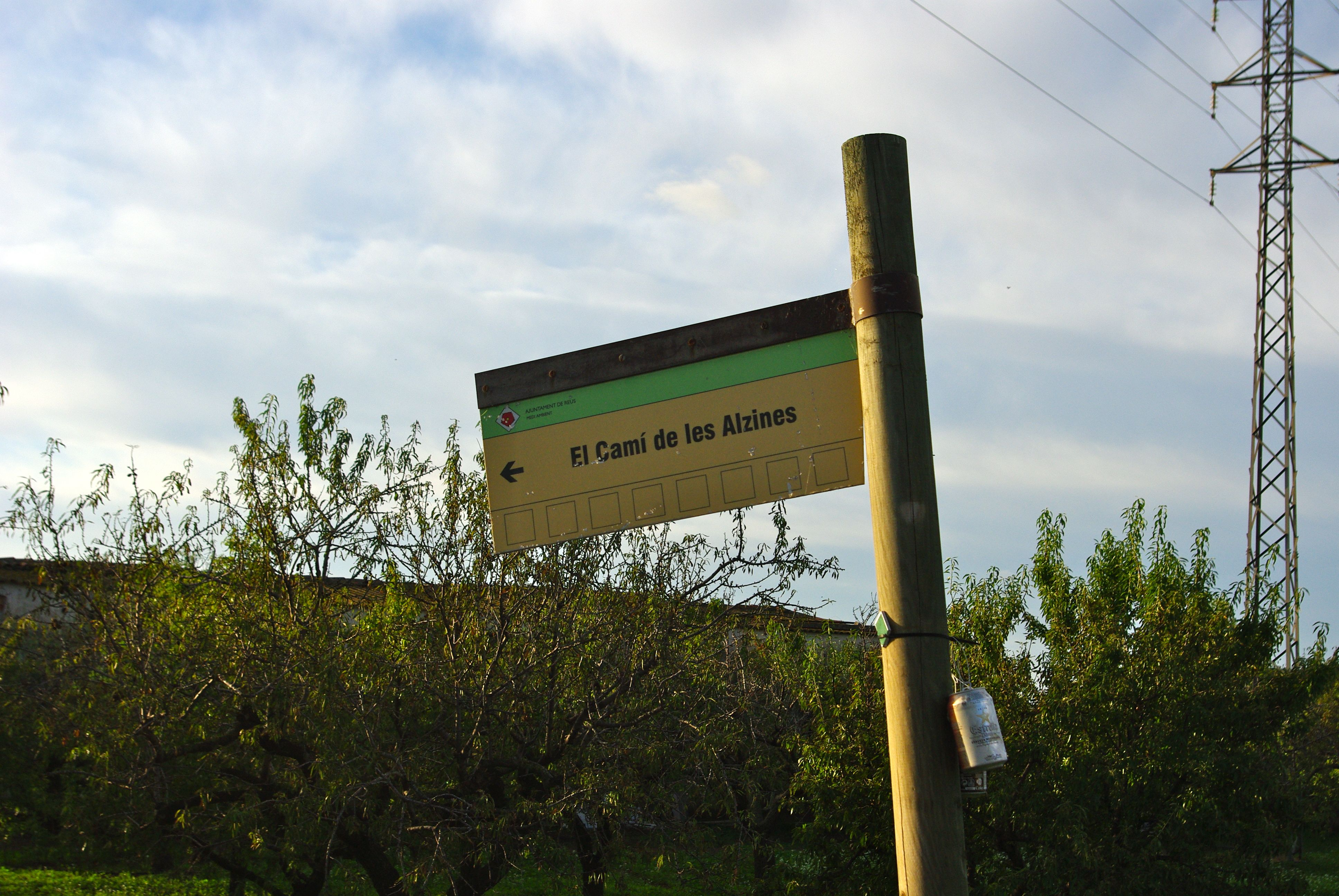 Camí de les Alzines, vora la riera del Burgar